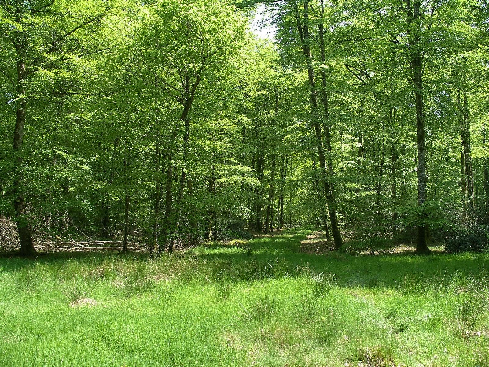 Forêt de Cerisy, Montfiquet (Calvados)